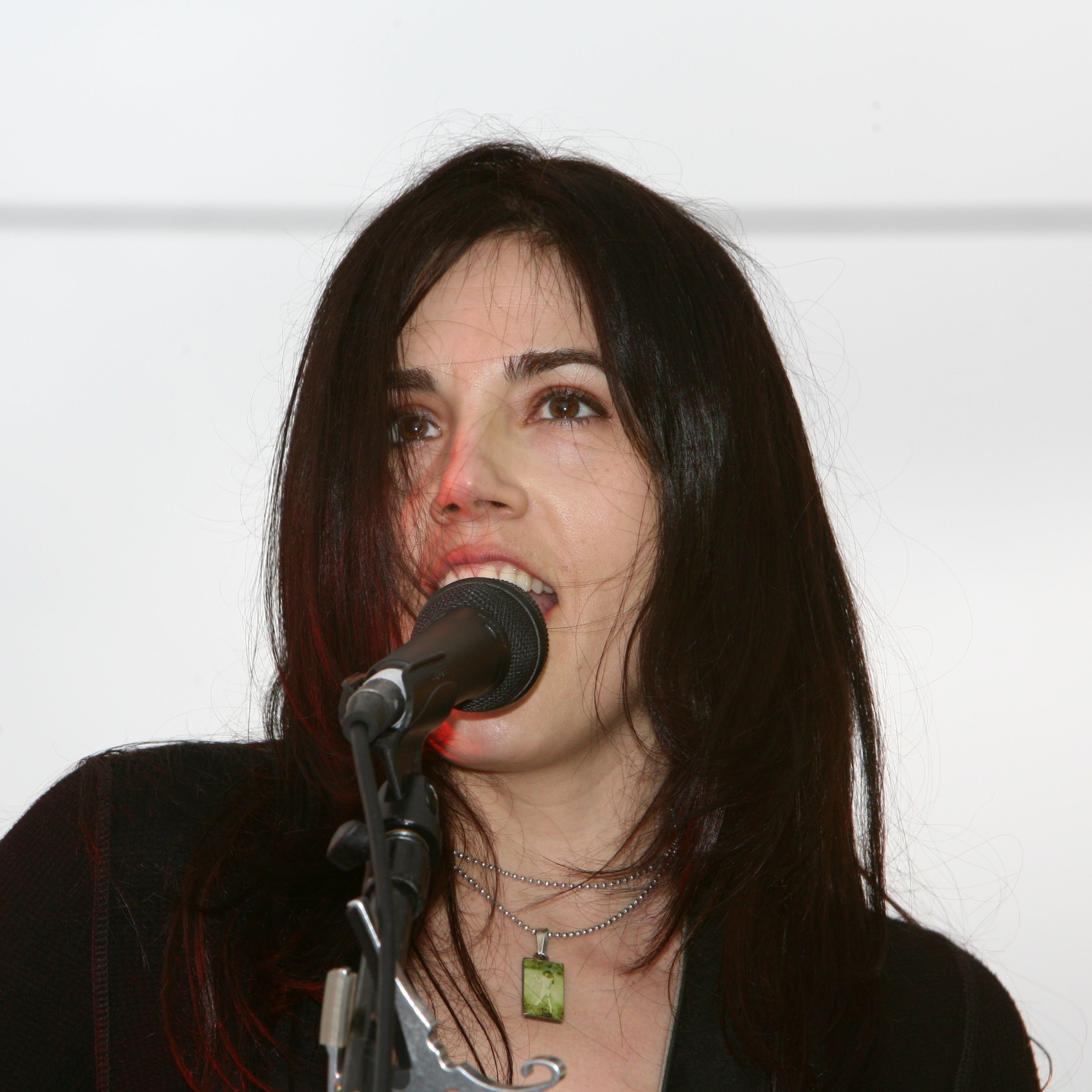 Saucy Monky at San Diego Indie Music Fest 2008